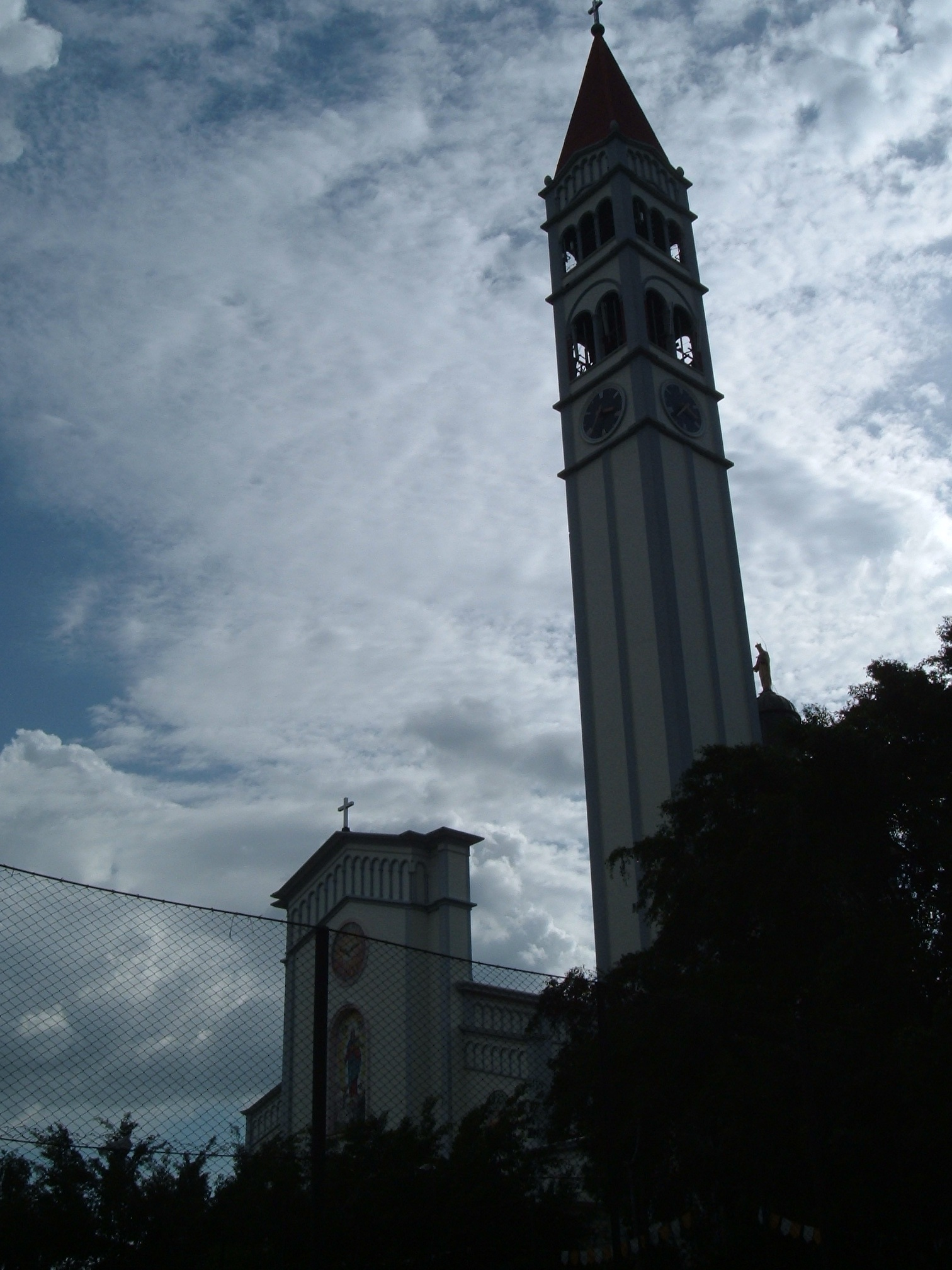 Silhouette of Iglesia Don Rúa in San Salvador, El Salvador